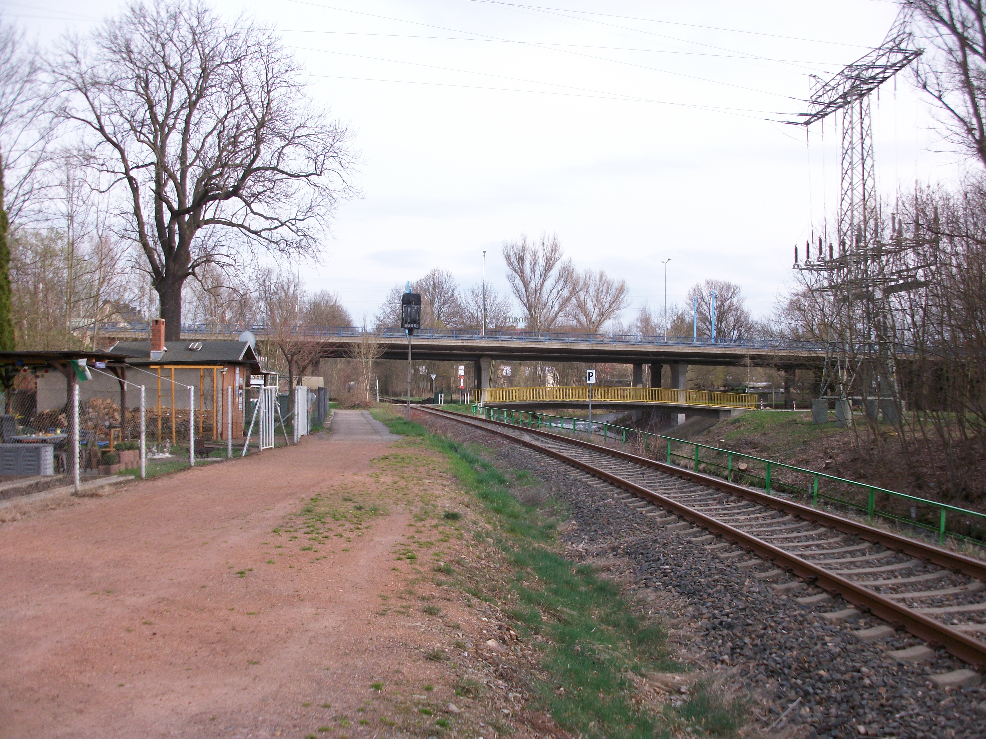 Standort des ehem. Haltepunkts Chemnitz-Markersdorfer Straße (2016), im Hintergrund die Überführung des Südrings über die Chemnitz und die Bahnstrecke Zwönitz–Chemnitz Süd